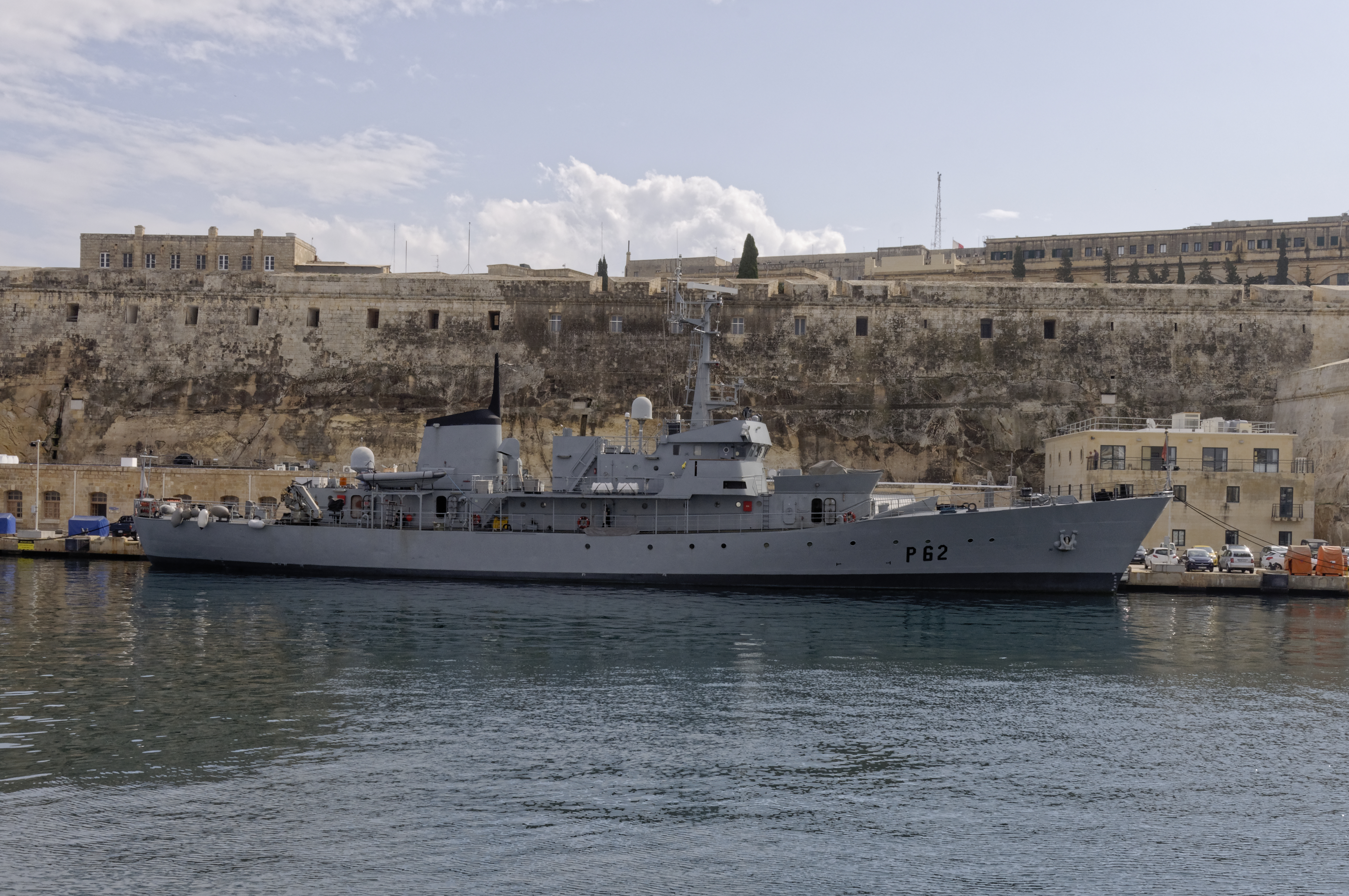 Malta-mix- 2019